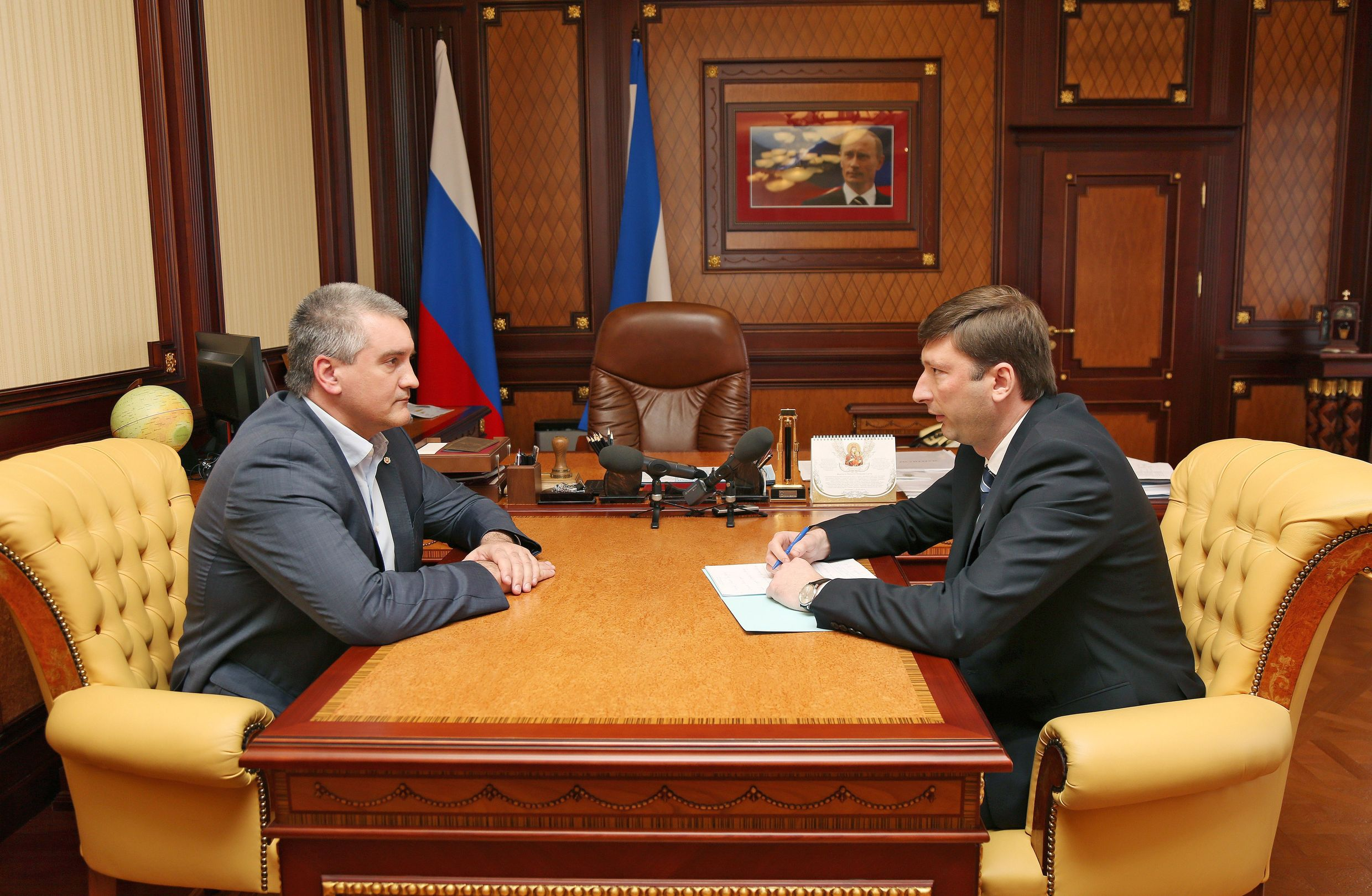 Встреча Аксёнова и Смирнова